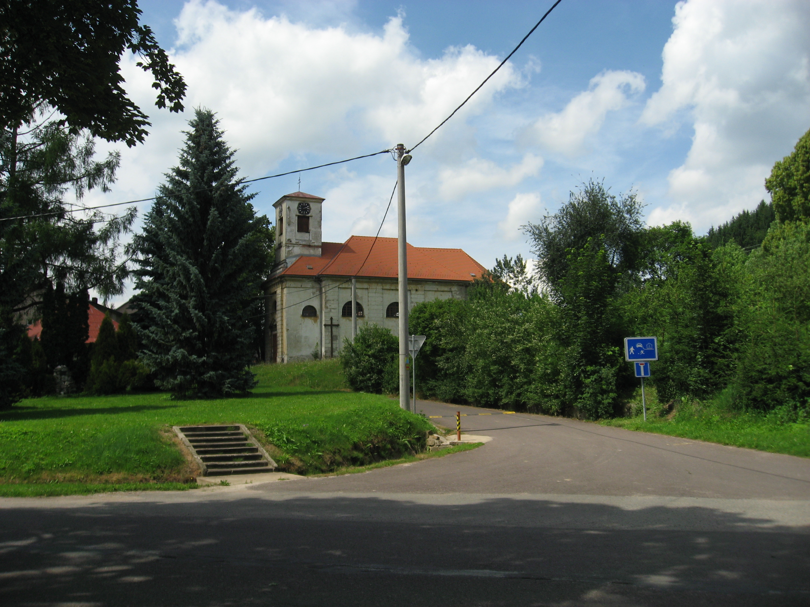 Kostel Povýšení svatého Kříže, Horní Adršpach